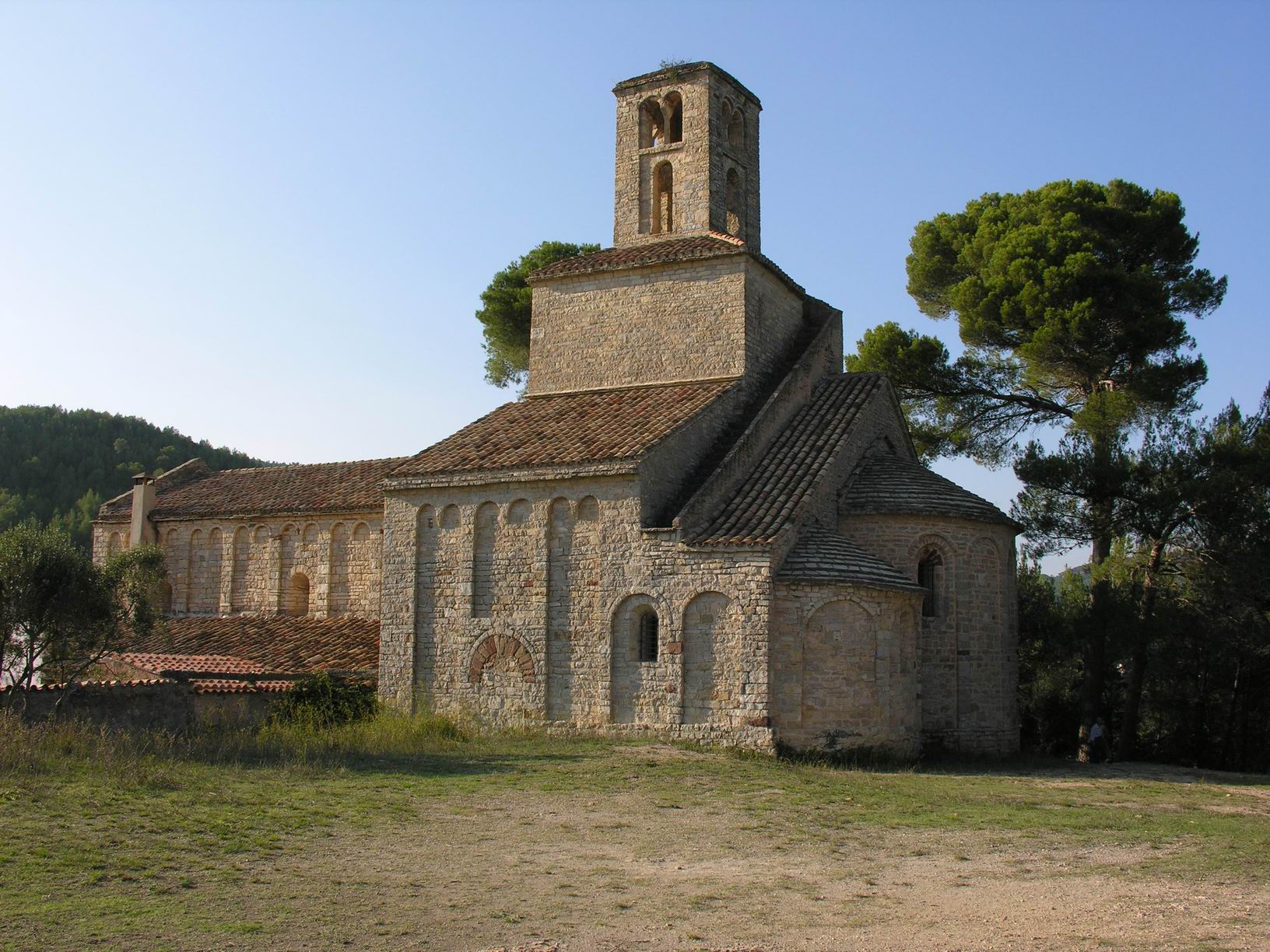 Façana sud del monestir de Sant Ponç de Corbera, a Cervelló (Baix Llobregat)